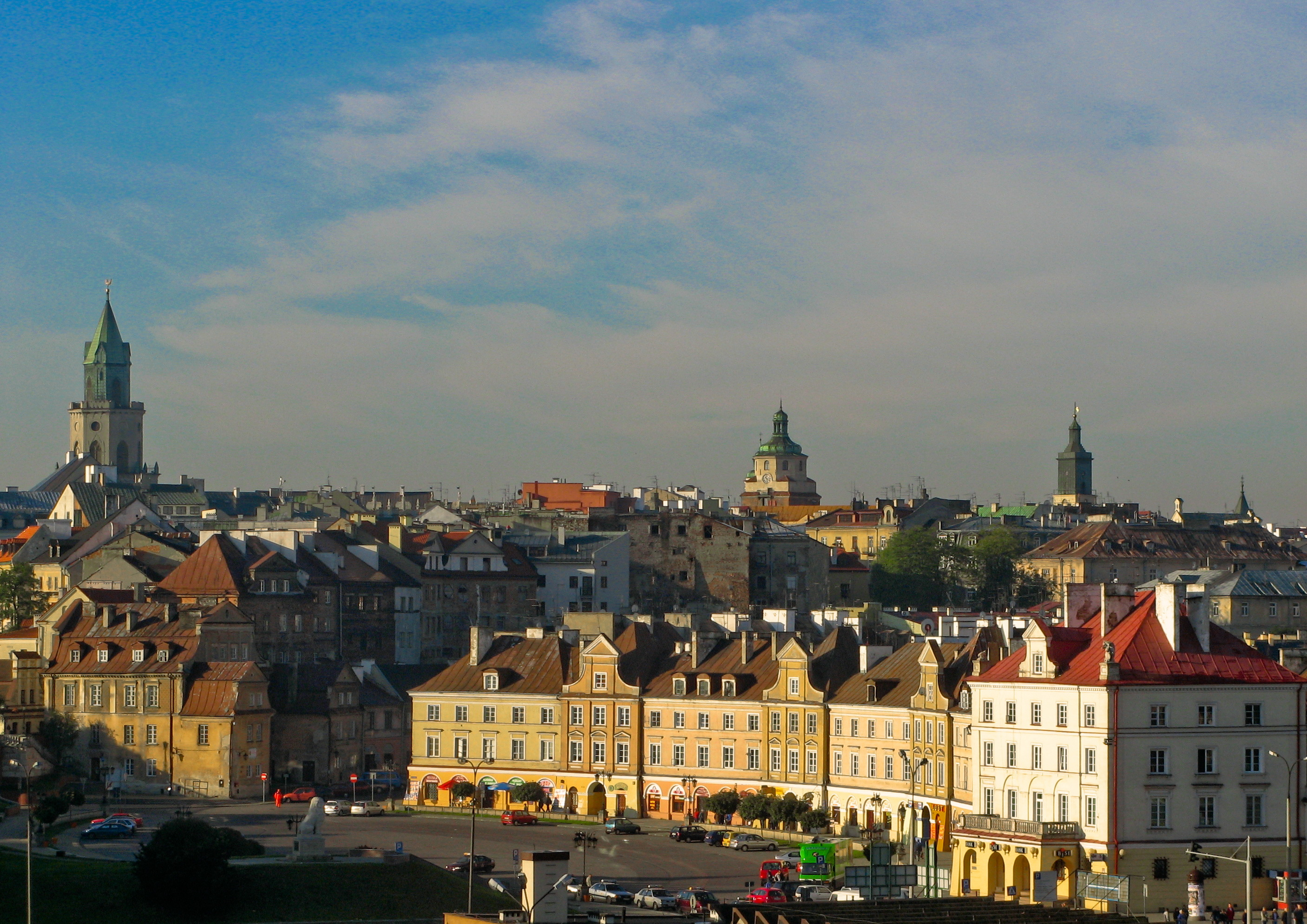 Lublin Plac Zamkowy Stare Miasto